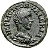 Portret van Valerianus II op een bronzen munt.